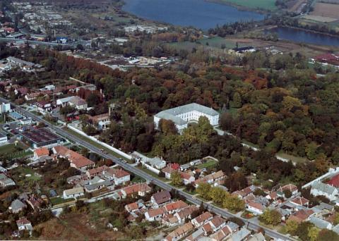 Bicske- Hungary